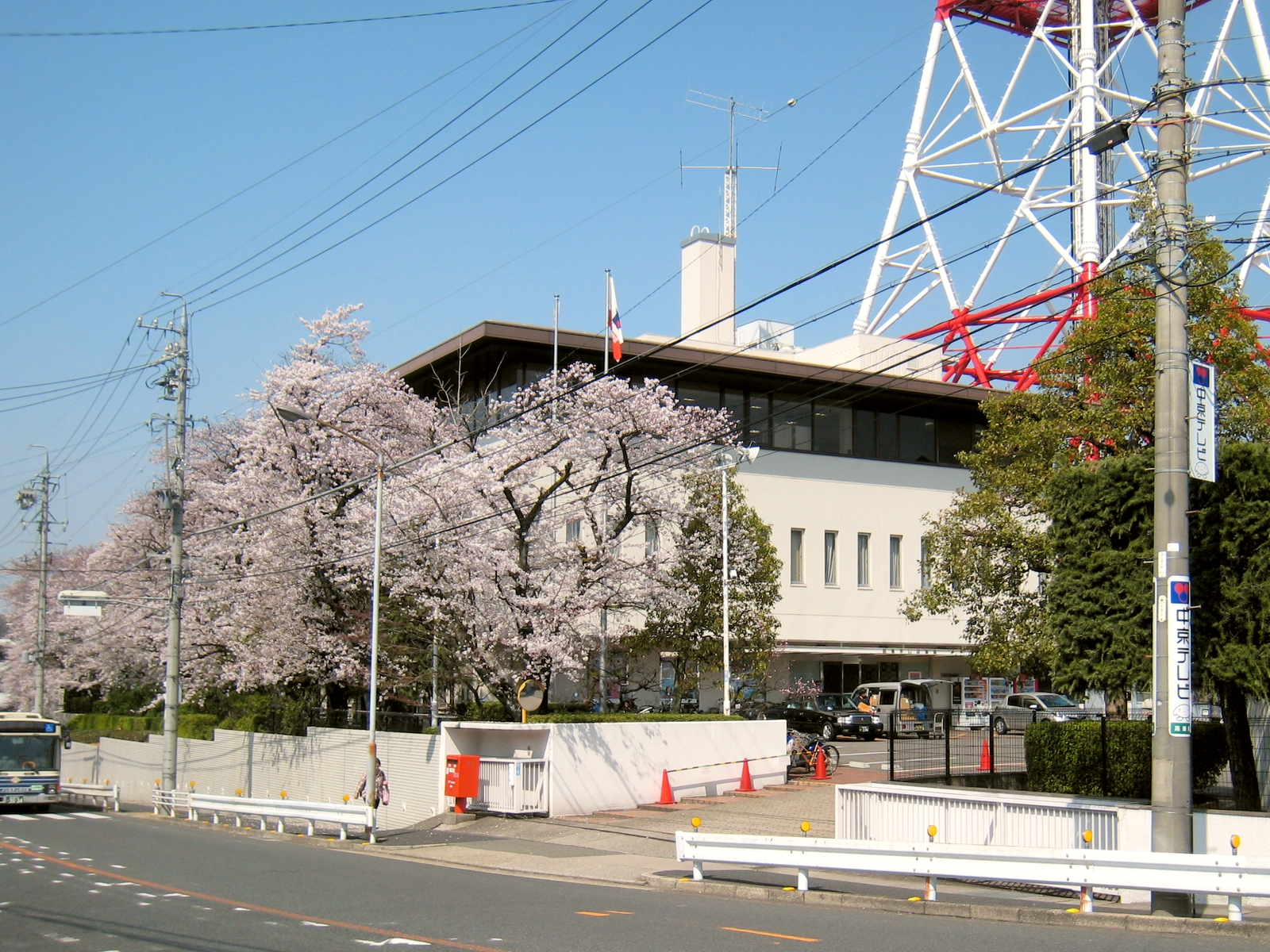 2016年まで使われていた中京テレビ本社旧社屋の本館（名古屋市昭和区高峯町）。ローカルバラエティの生放送でお馴染みだったBスタジオがあった建物。2015年3月31日撮影。